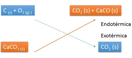 En esta imagen se ilustra una reacción.